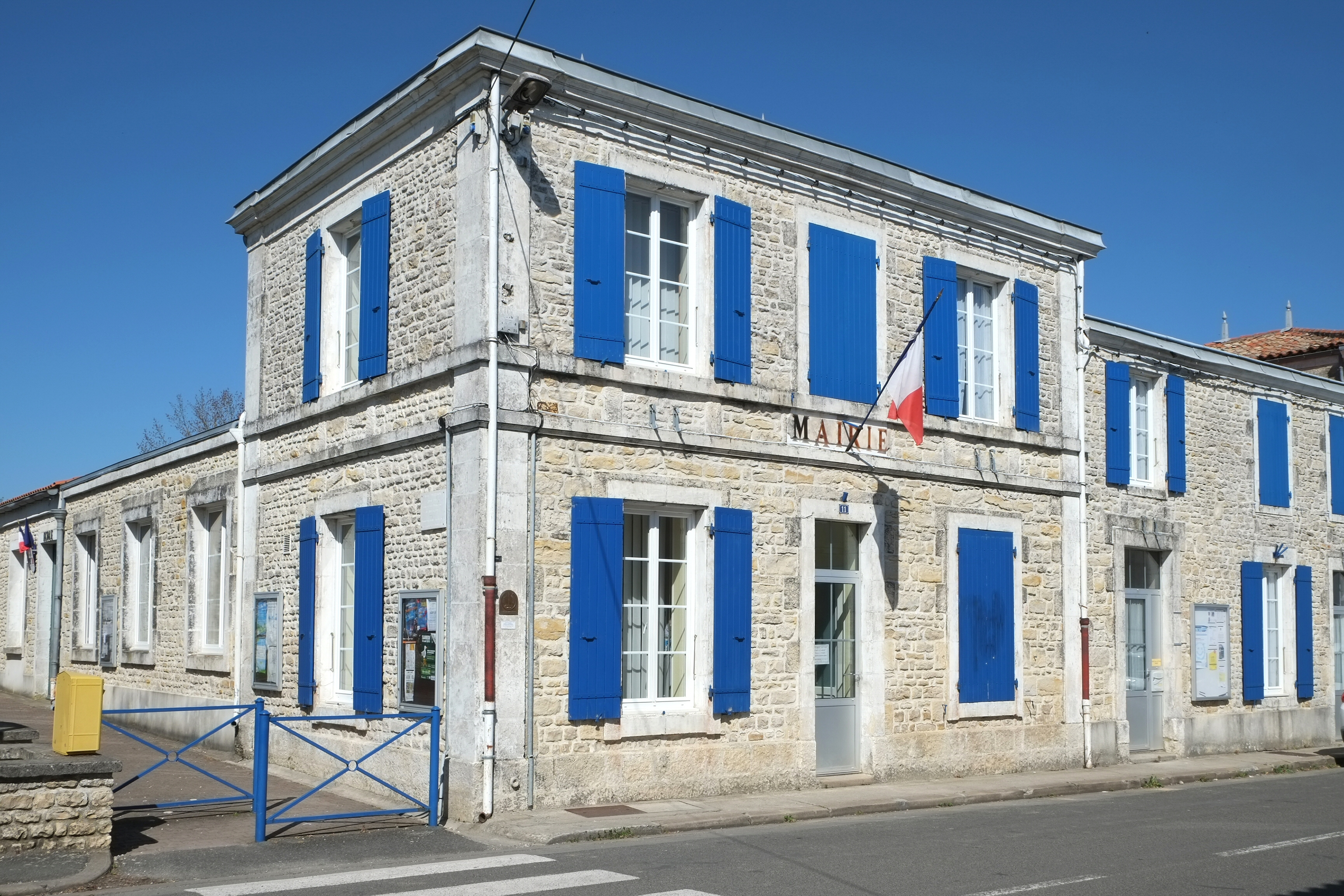 Mairie Saint-Christophe Charente-Maritime France